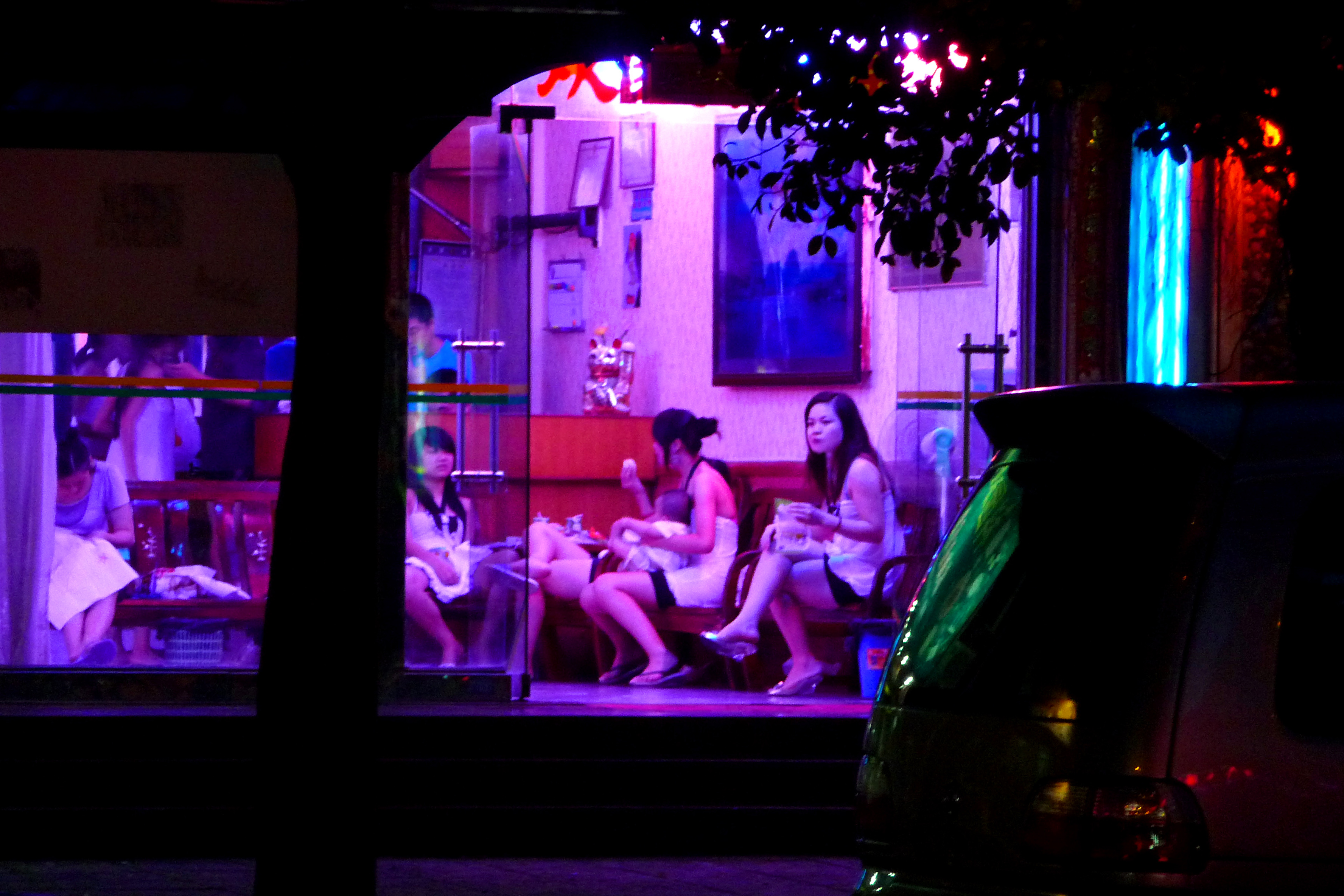 Barber shop girls Bao'an Shenzhen